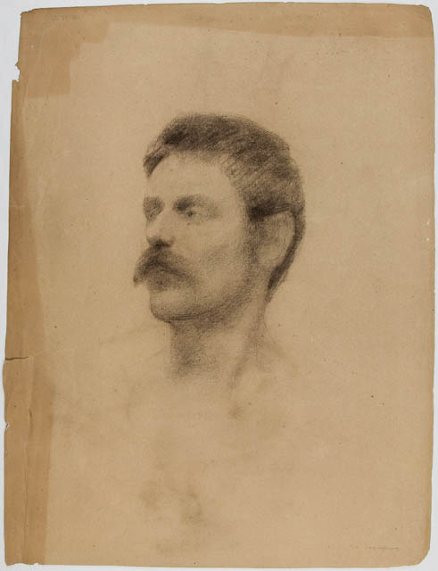 Картины Минервы Жозефины Чапман